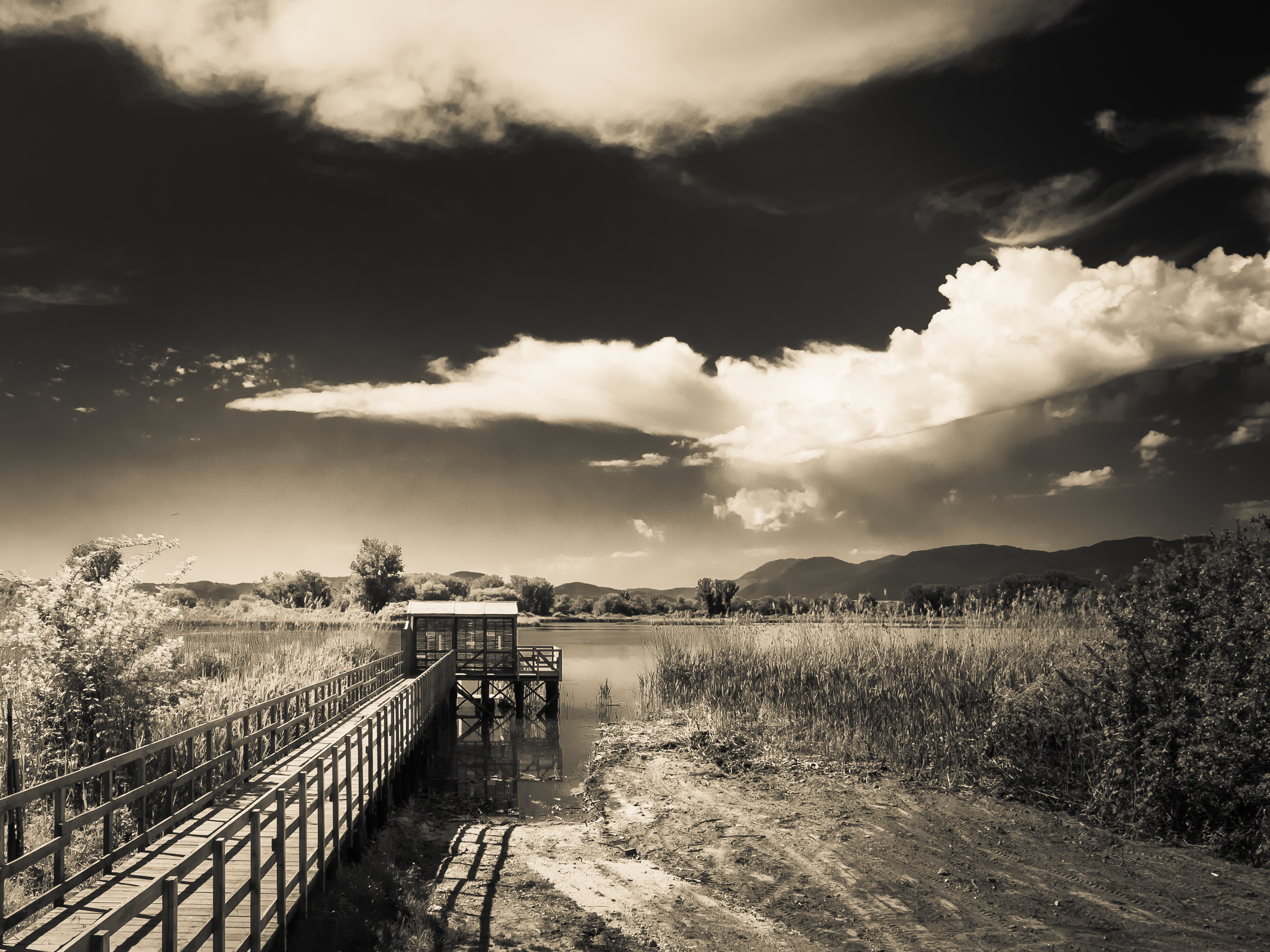 Riserva naturale Laghi Lungo e Ripasottile This is a photo of a monument which is part of cultural heritage of Italy.